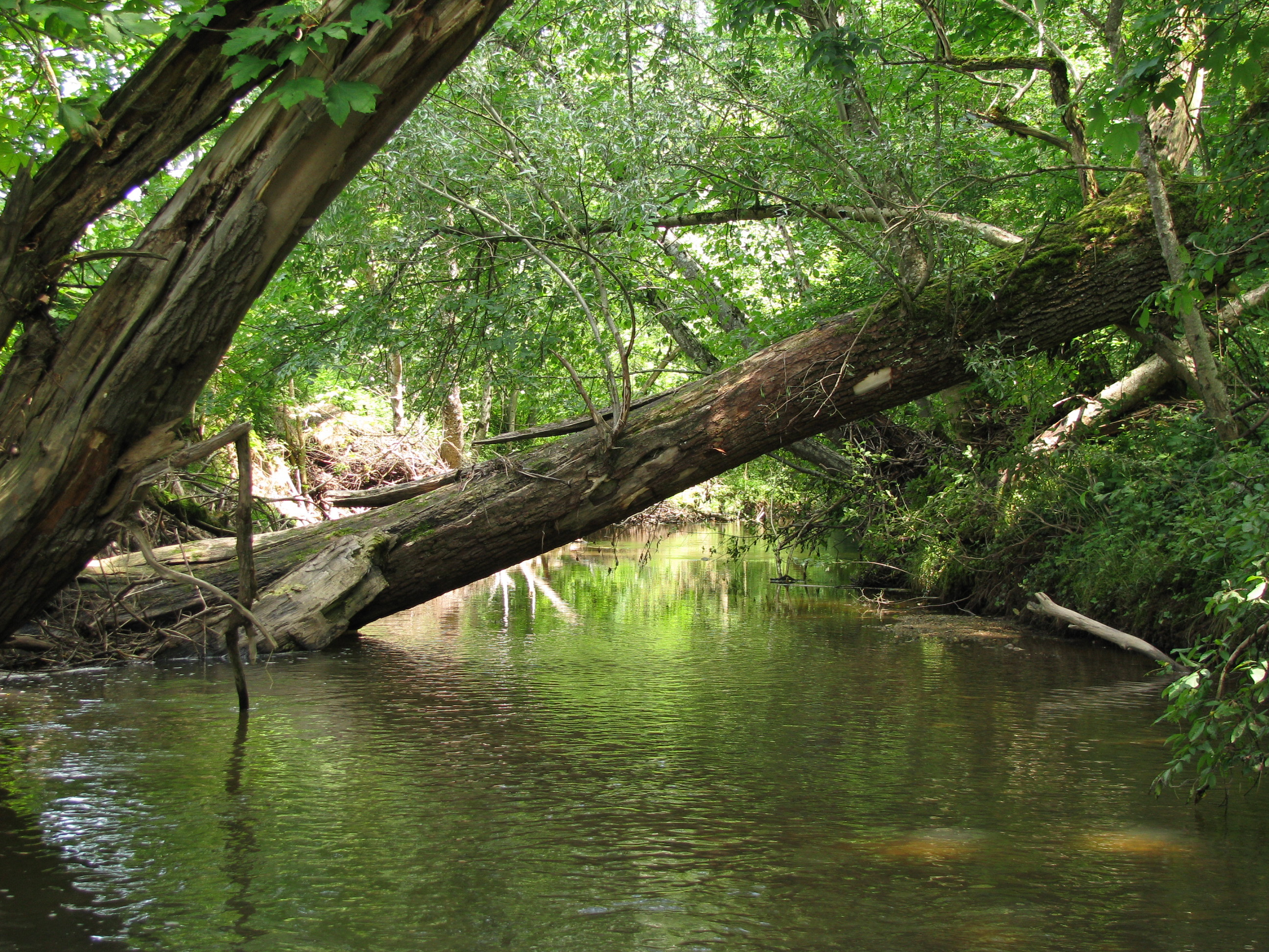 Die Rott bei Stillern (flussabwärts gesehen).